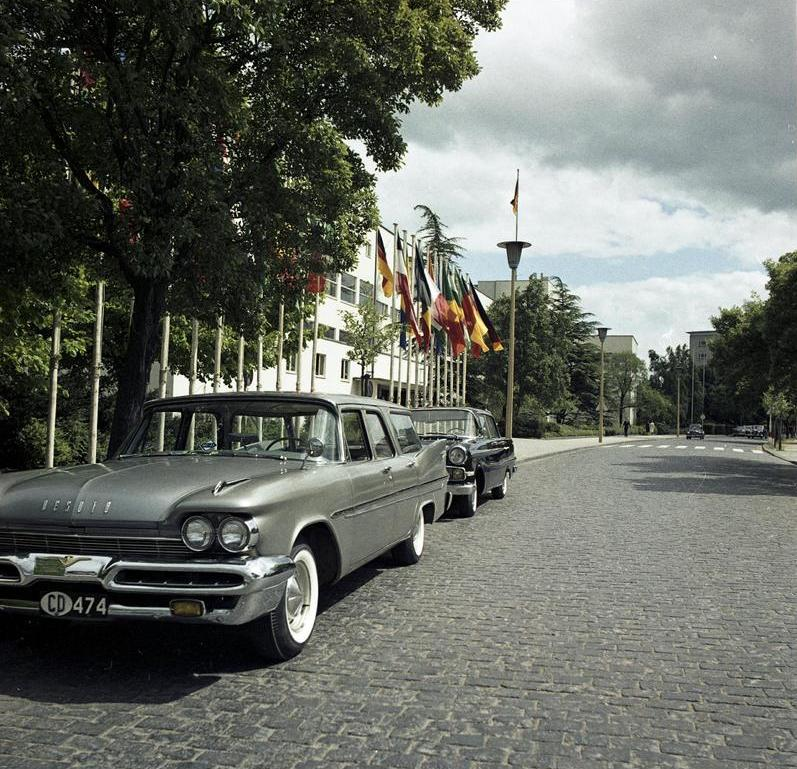 Bundeshaus in Bonn